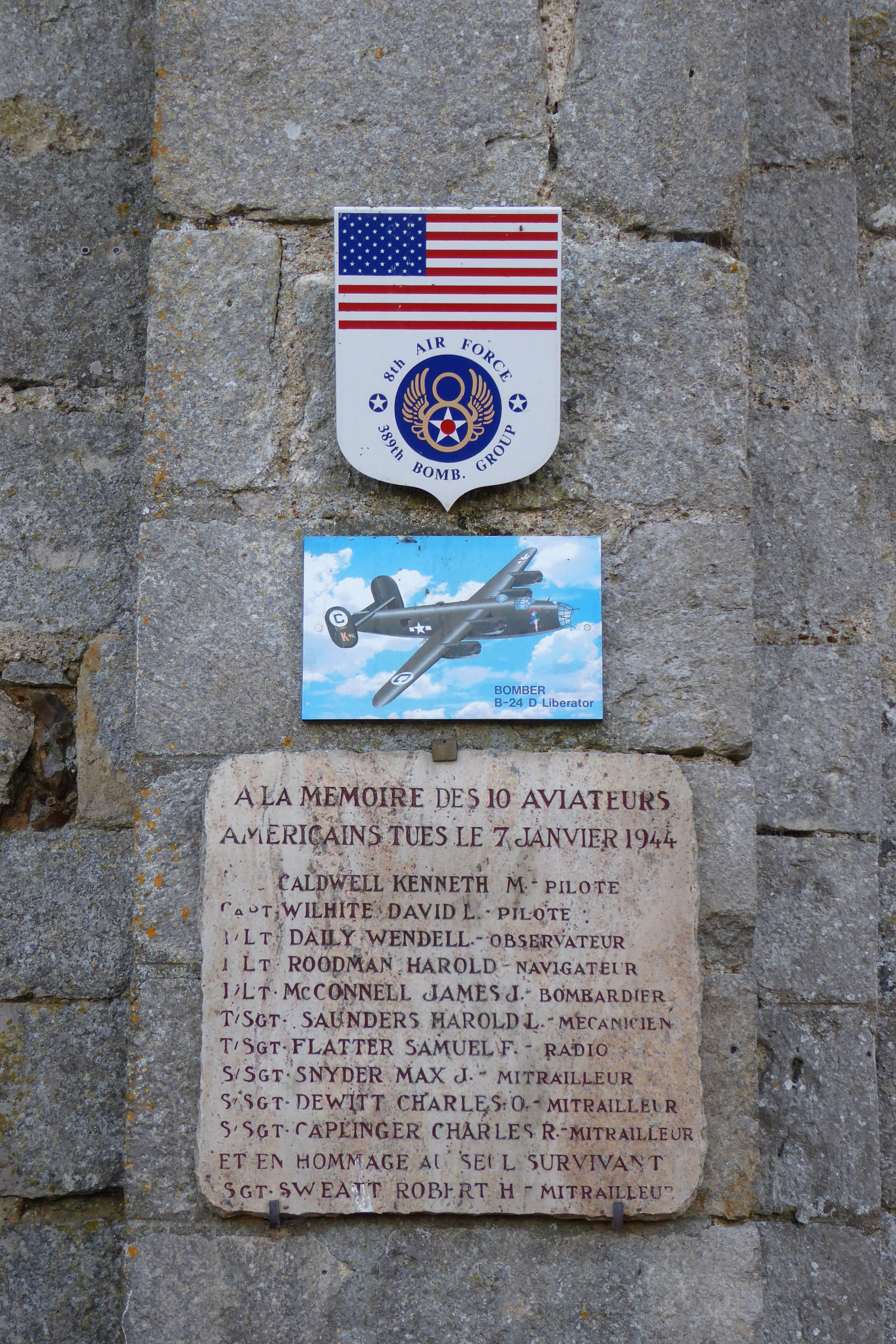 Plaques commémoratives du 7 janvier 1944, apposées en 2004, Bouville, Eure-et-Loir, France.